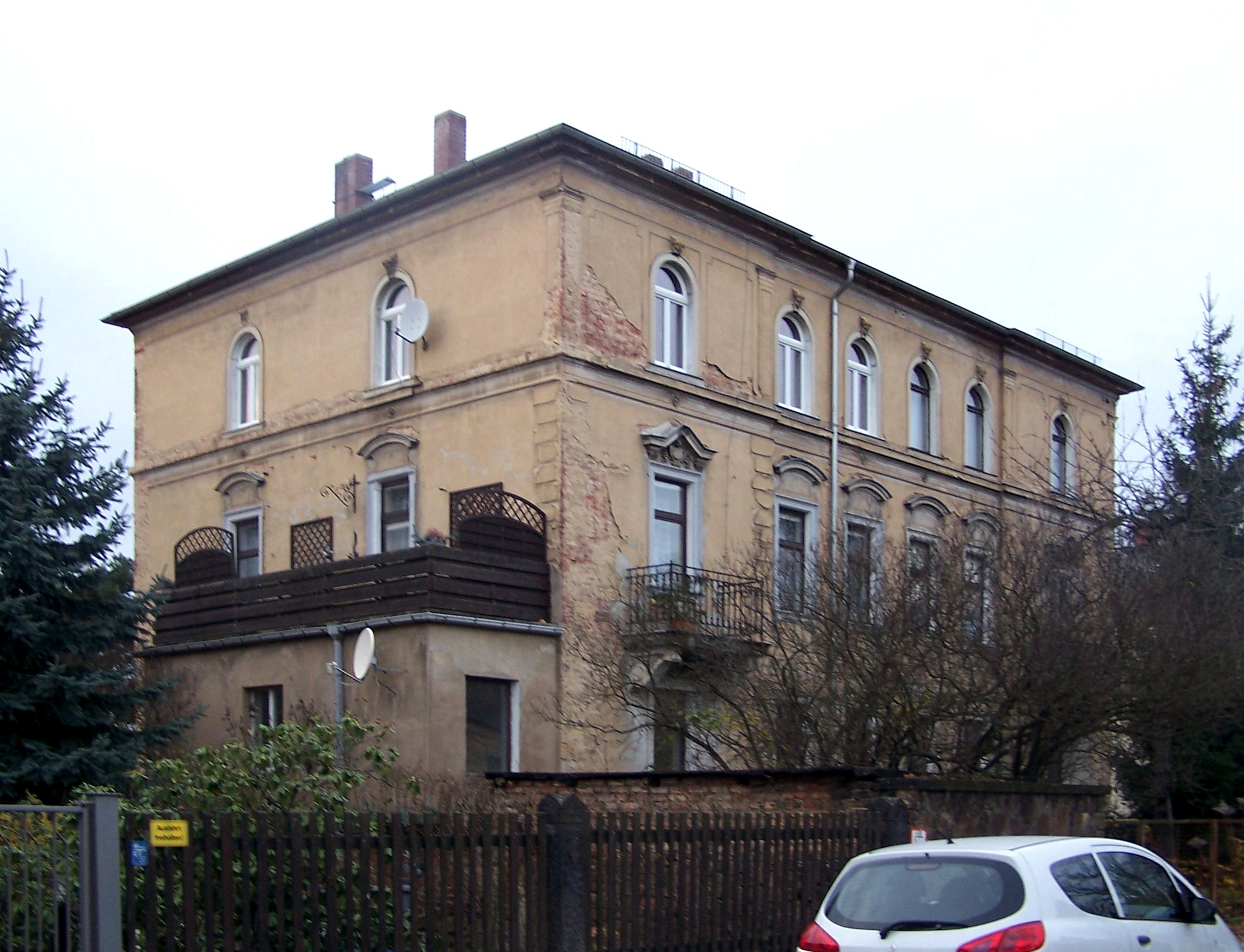 Gellertstr. 6 in Radebeul